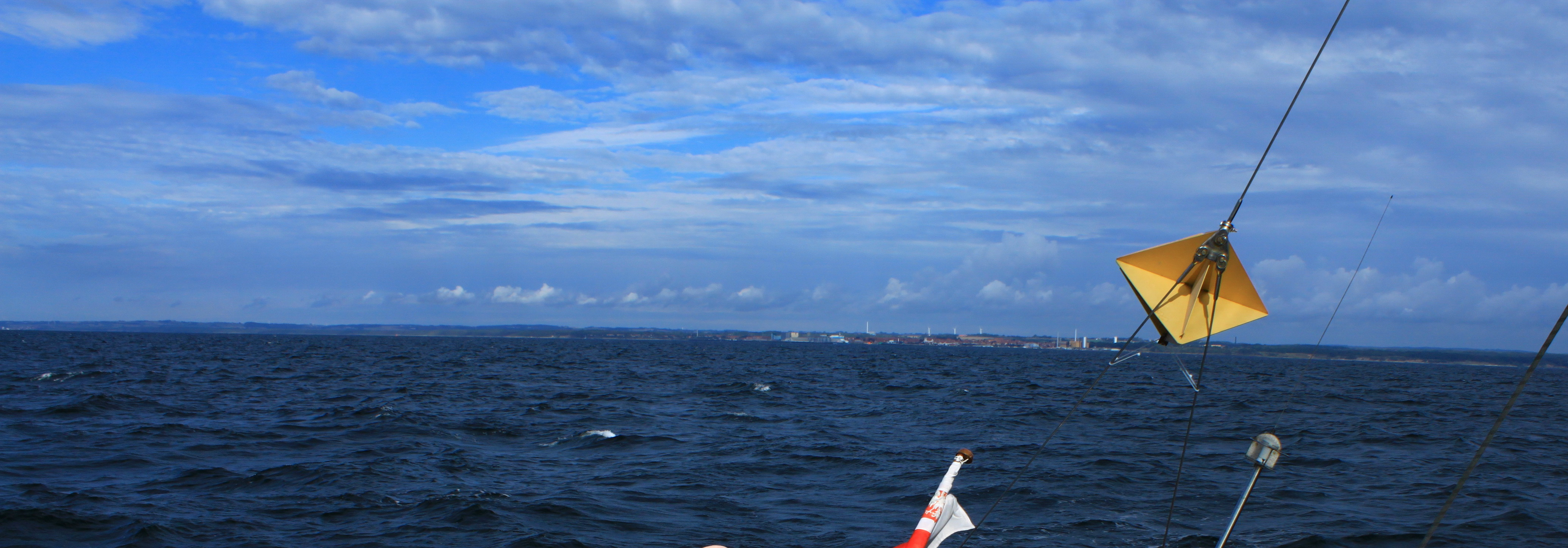 wybrzeże Bornholmu w okolicach portu Rønne